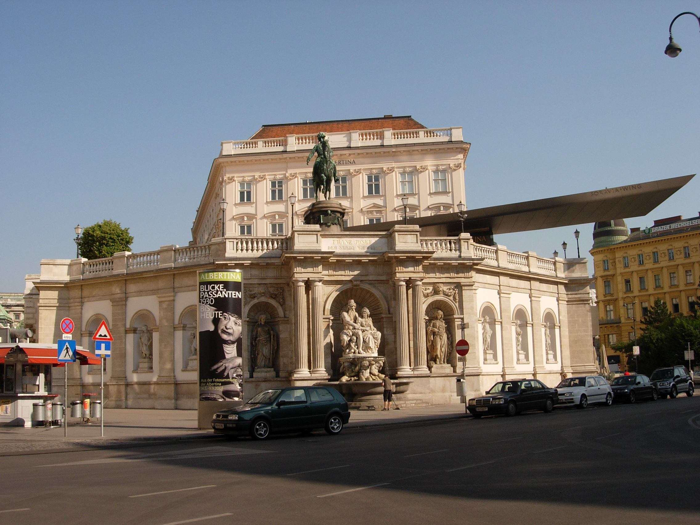 Vienna